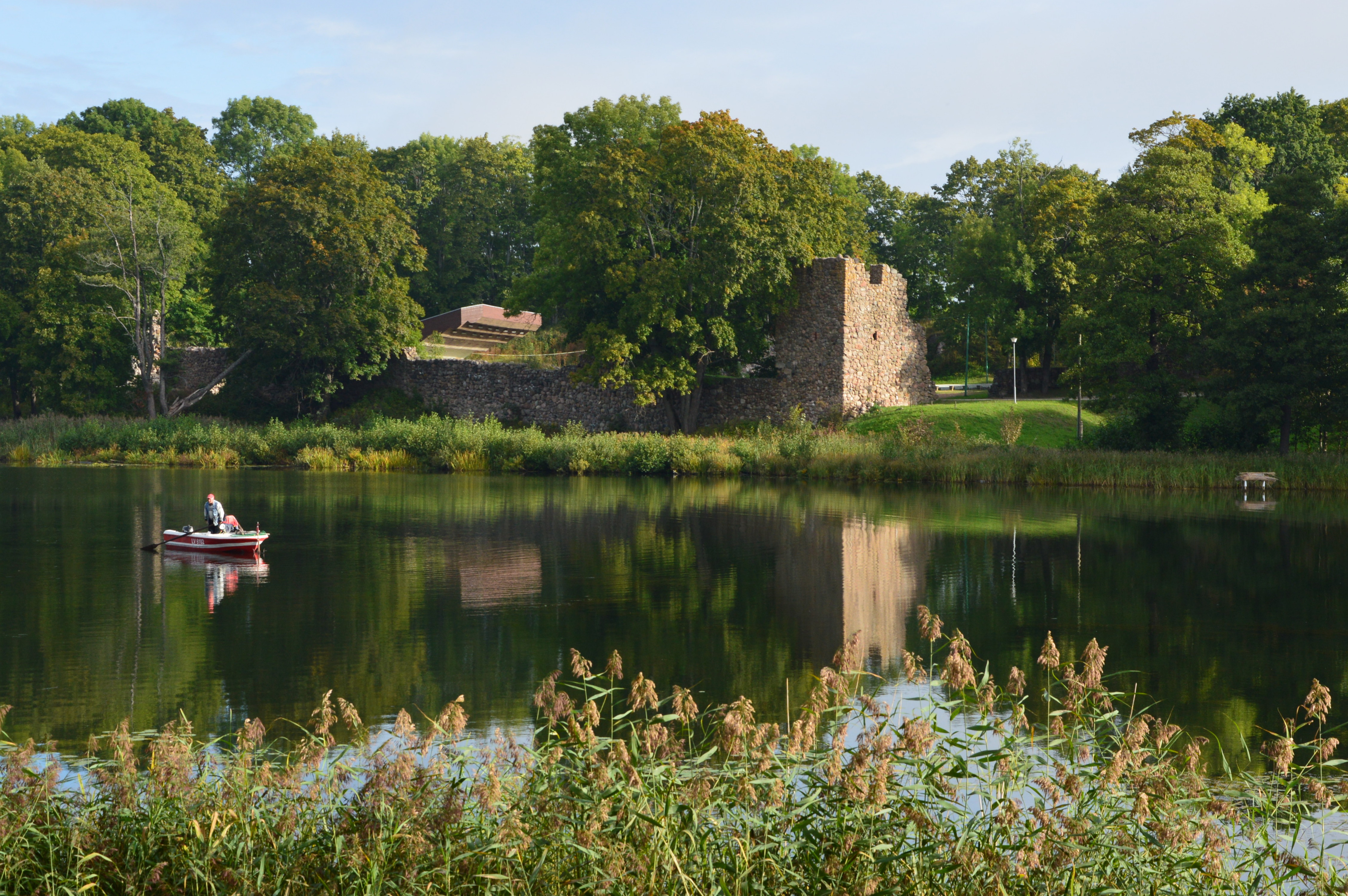 Alūksne ordulinnus